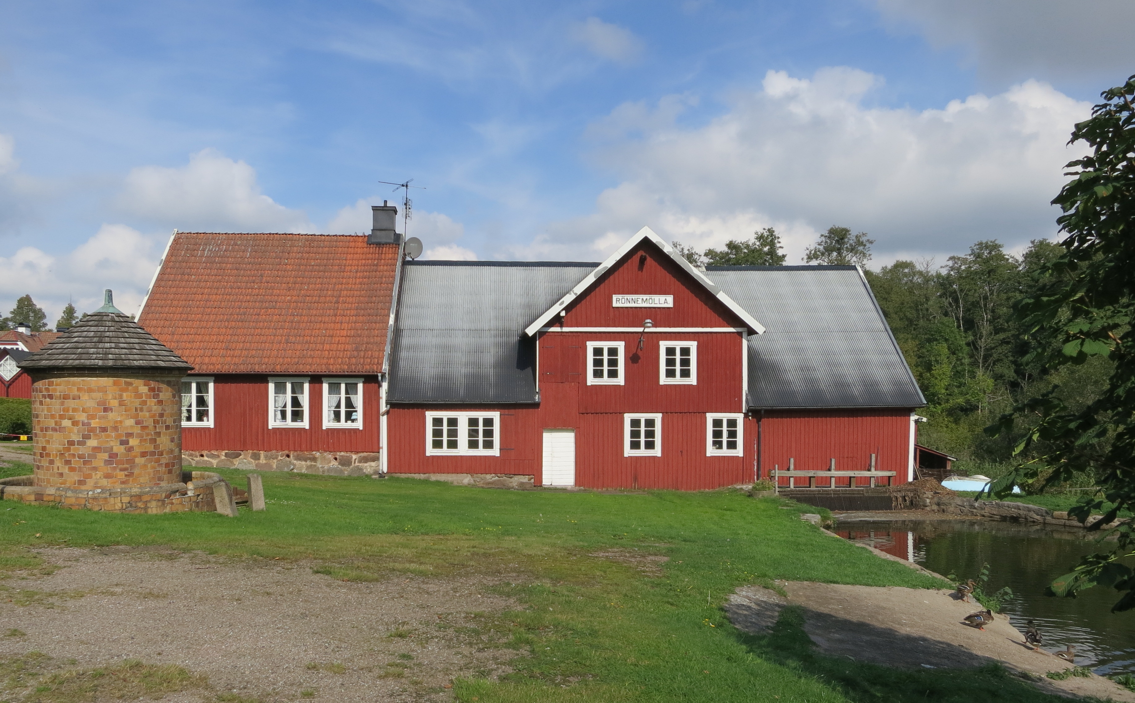 Rönnemölla i Stockamöllan